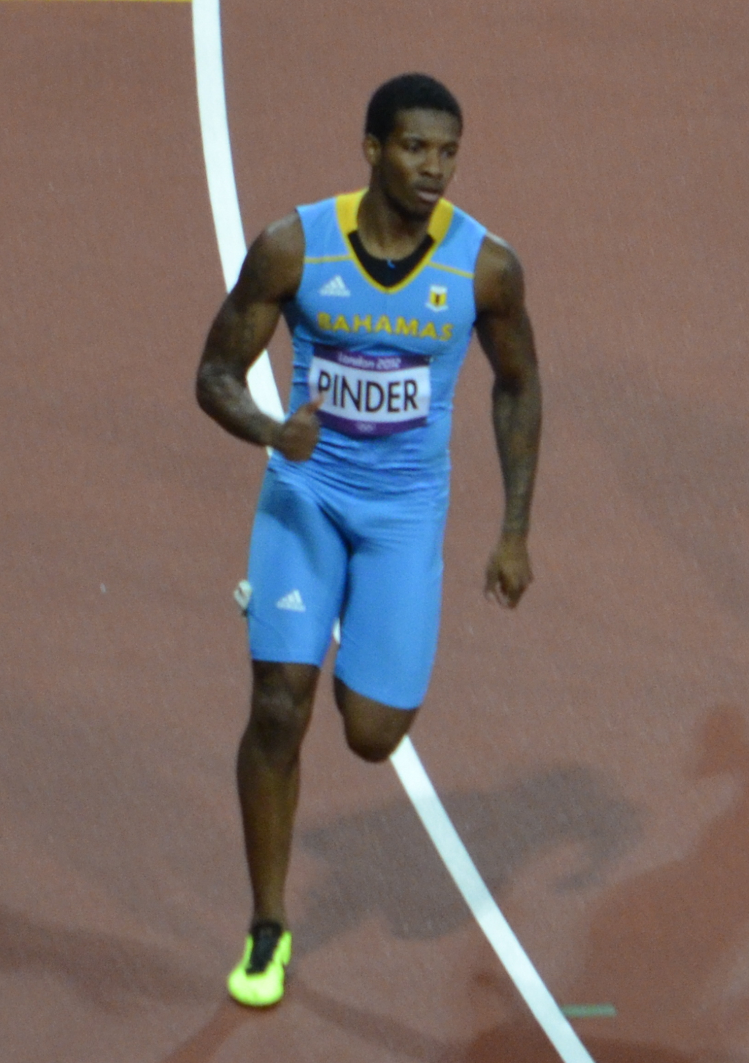 _D704712